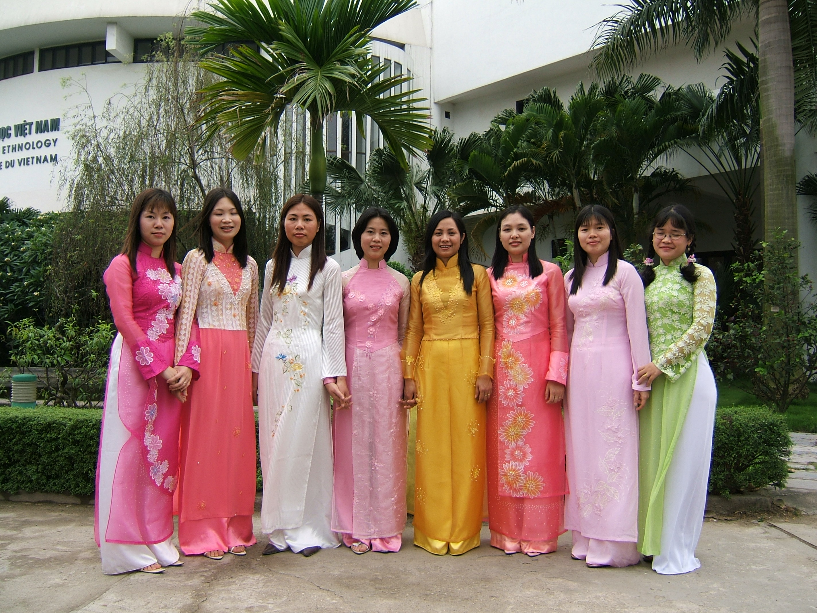 Một số loại áo dài dành cho lễ hội, chụp tại Bảo tàng Dân tộc học Việt Nam